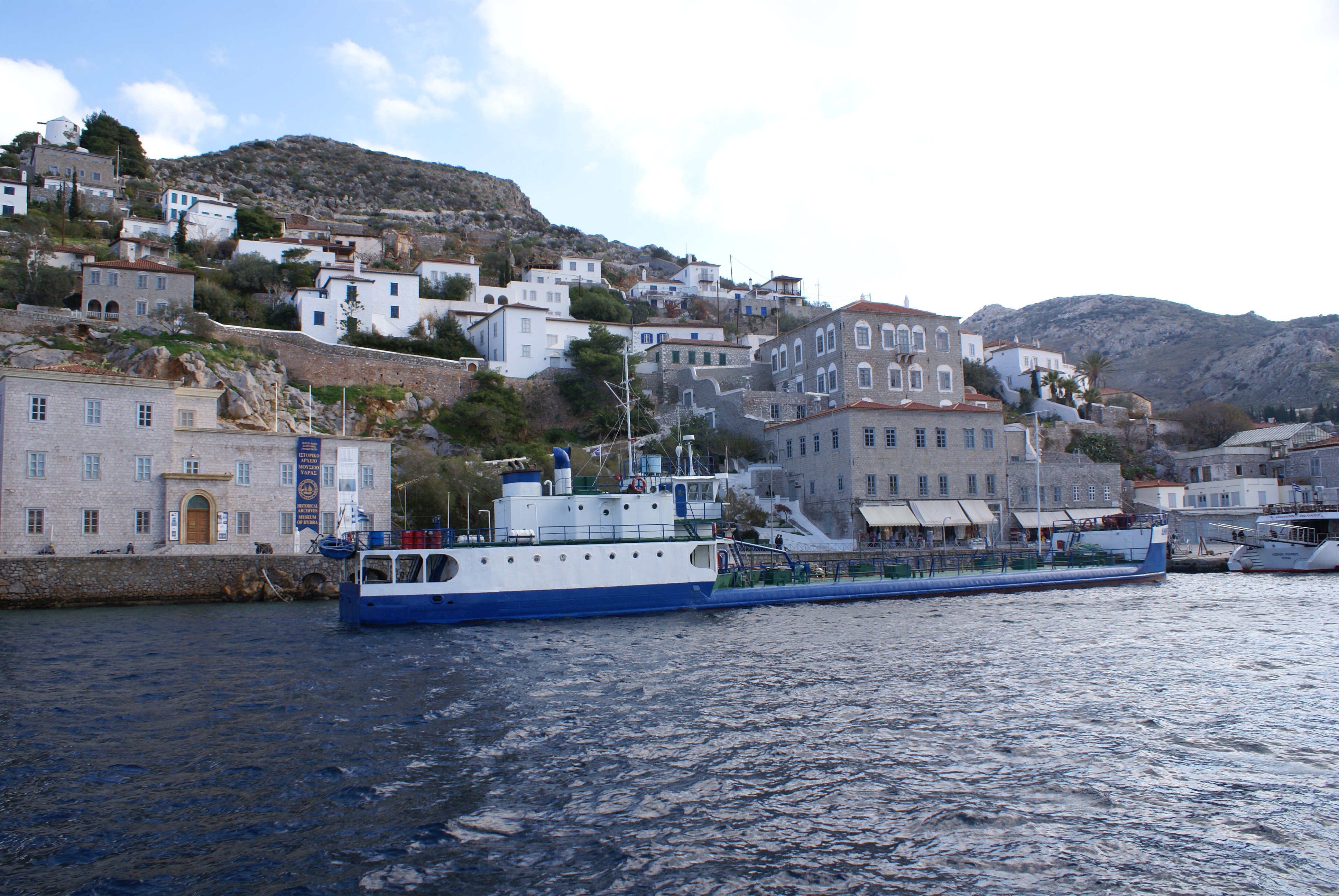 Water tanker at Hydra harbour